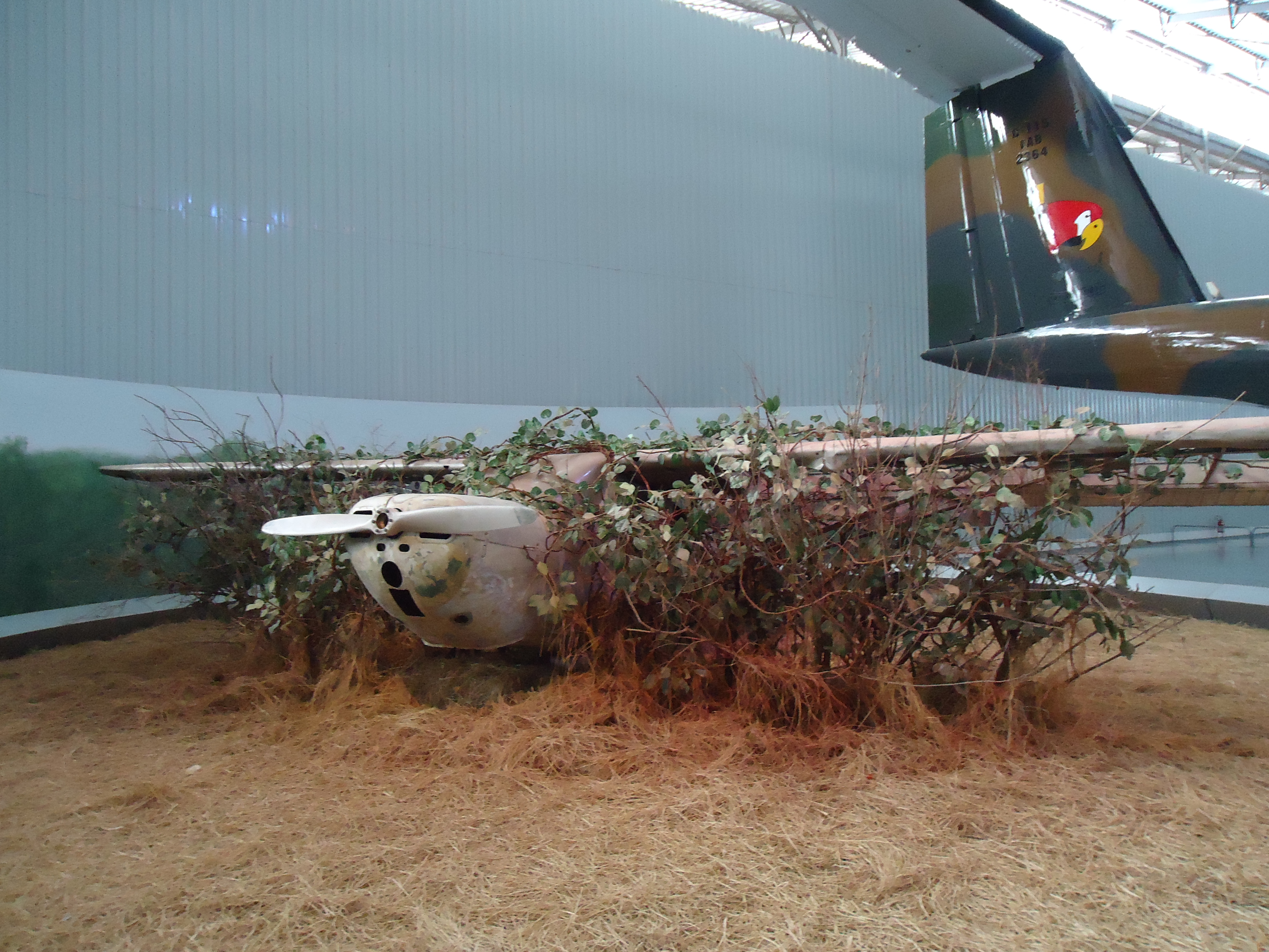 Montagem decorativa com carcaça de avião - Museu TAM